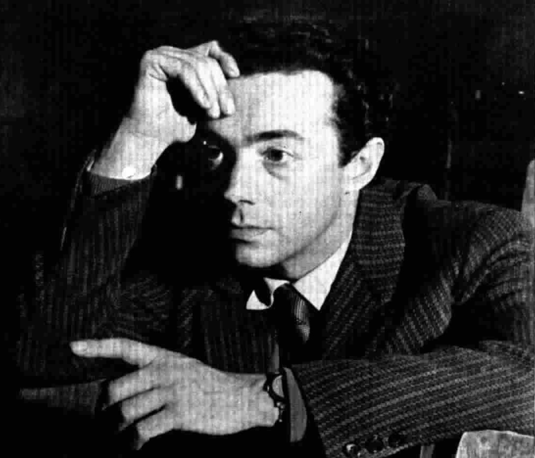 Commediografo, regista e critico teatrale italiano.